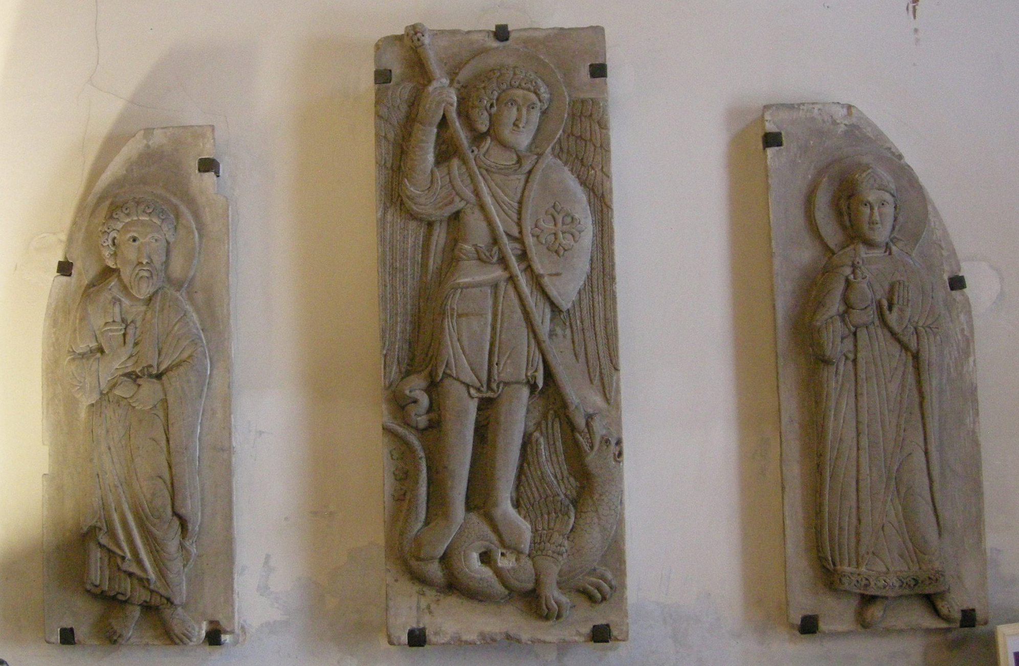 Chiesa di san gaetano, sculture romaniche del XIII secolo